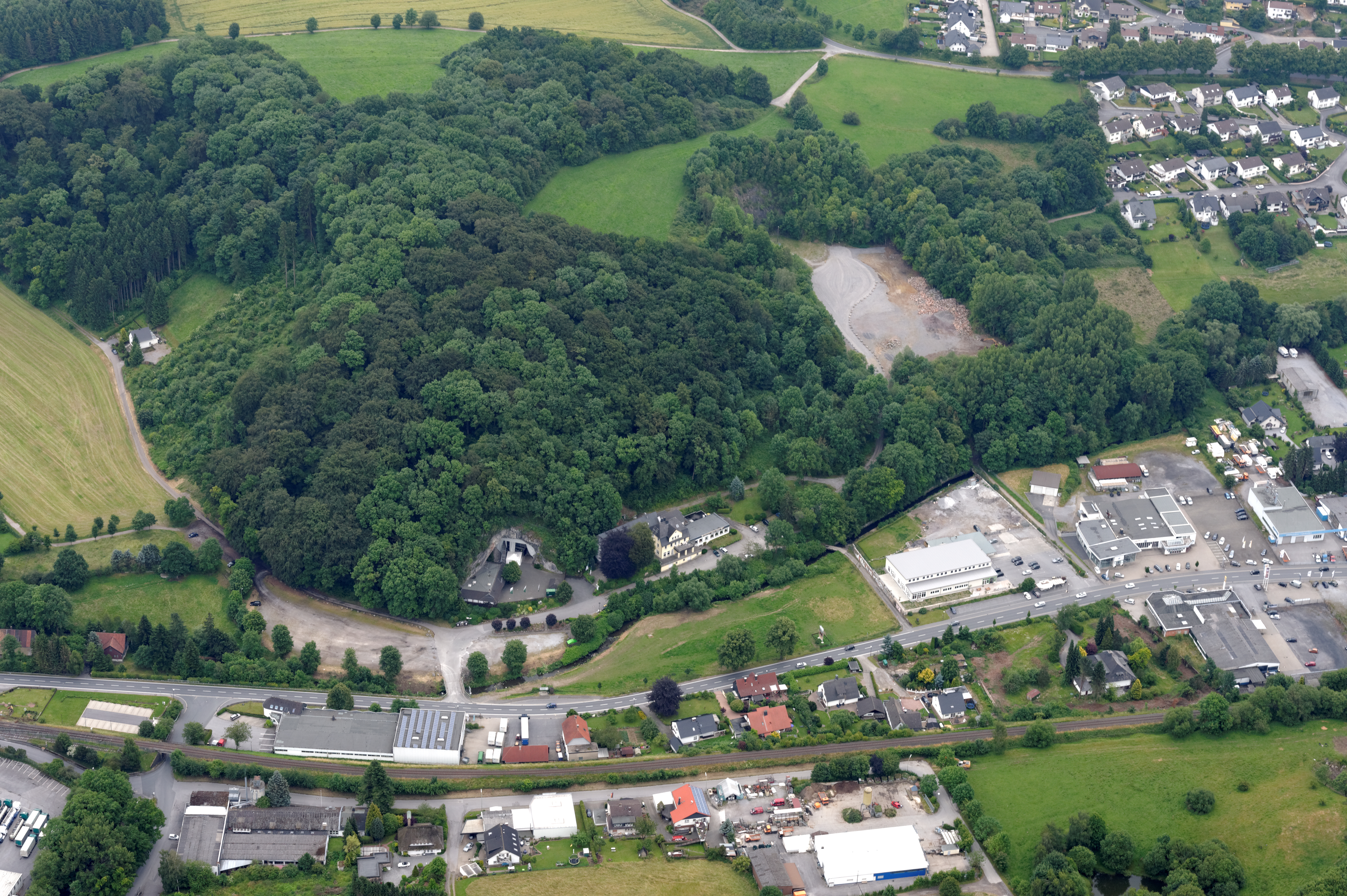 Fotoflug Sauerland Nord. Balve: Teil von Balve mit dem Eingang zur Balver Höhle The making of this document was supported by the Community-Budget of Wikimedia Germany.